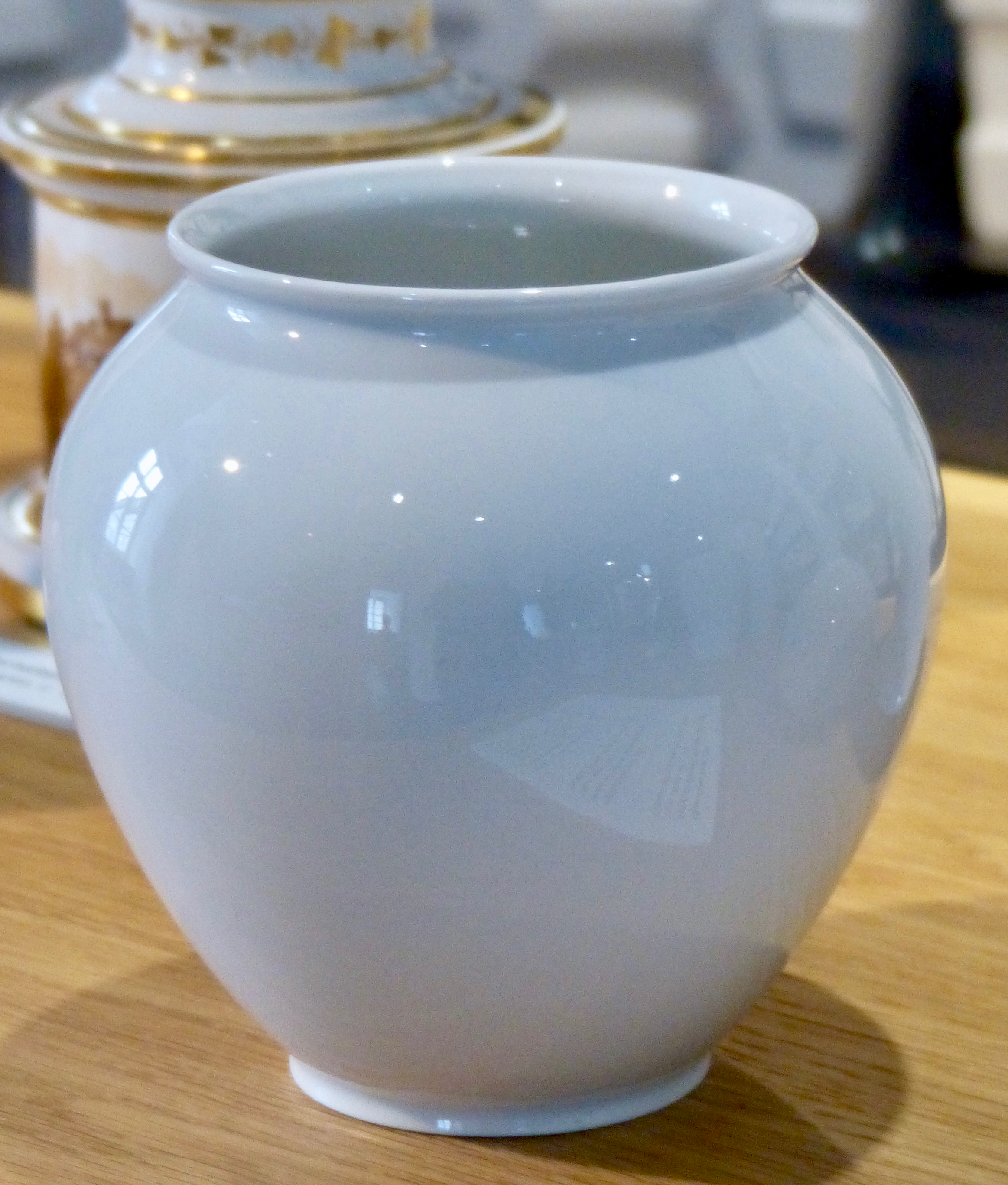 Einmachhafen von Siegfried Möller, Form 1047, Ausformung 1942 GLAM-on-Tour: Porzellanmanufaktur Fürstenberg Wikipedianer fotografierten vom 6.– 8. Oktober 2017 die Ausstellungstücke im Museum Schloss Fürstenberg, Glasmuseum Boffzen und im Kragstuhlmuseum. This photo was taken during a project supported by WMDE Gefördert von / Supported by: Wikimedia Deutschland, Museum Schloss Fürstenberg, Glasmuseum Boffzen und Kragstuhlmuseum Für das Museum Schloss Fürstenberg: This work is free and may be used by anyone for any purpose. If you wish to use this content, you do not need to request permission as long as you follow any licensing requirements mentioned on this page.